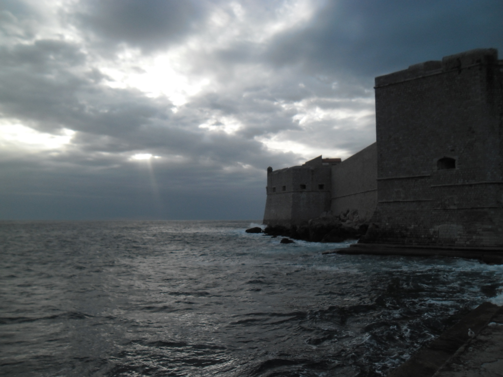 pogled na Porporelu, Dubrovnik